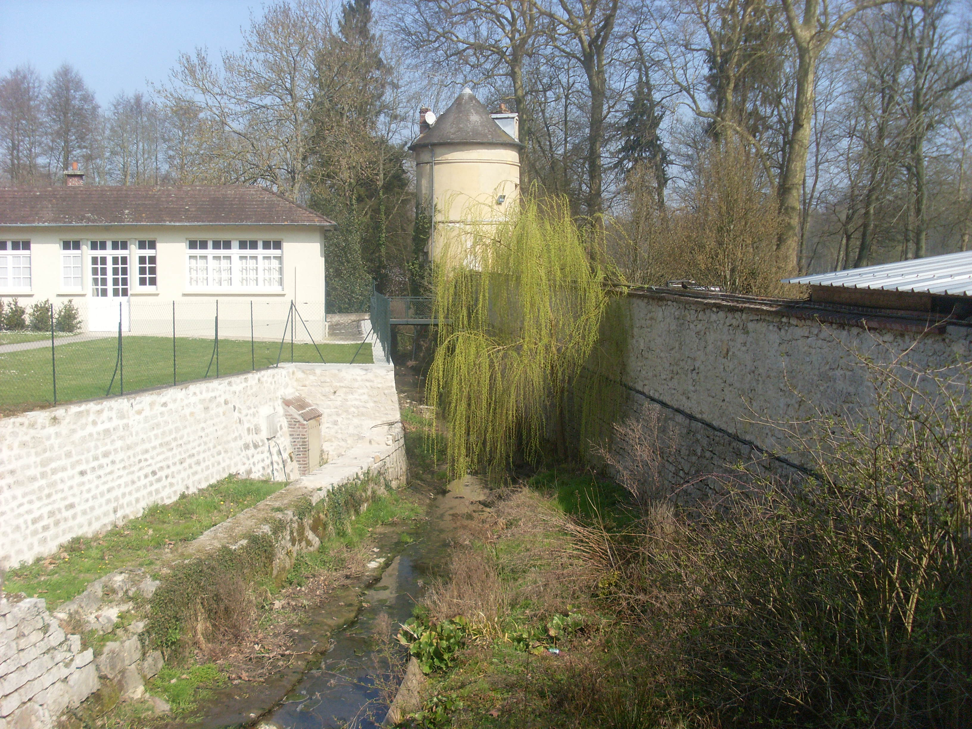 La Launette à Ermenonville sous le pont de la Lanterne